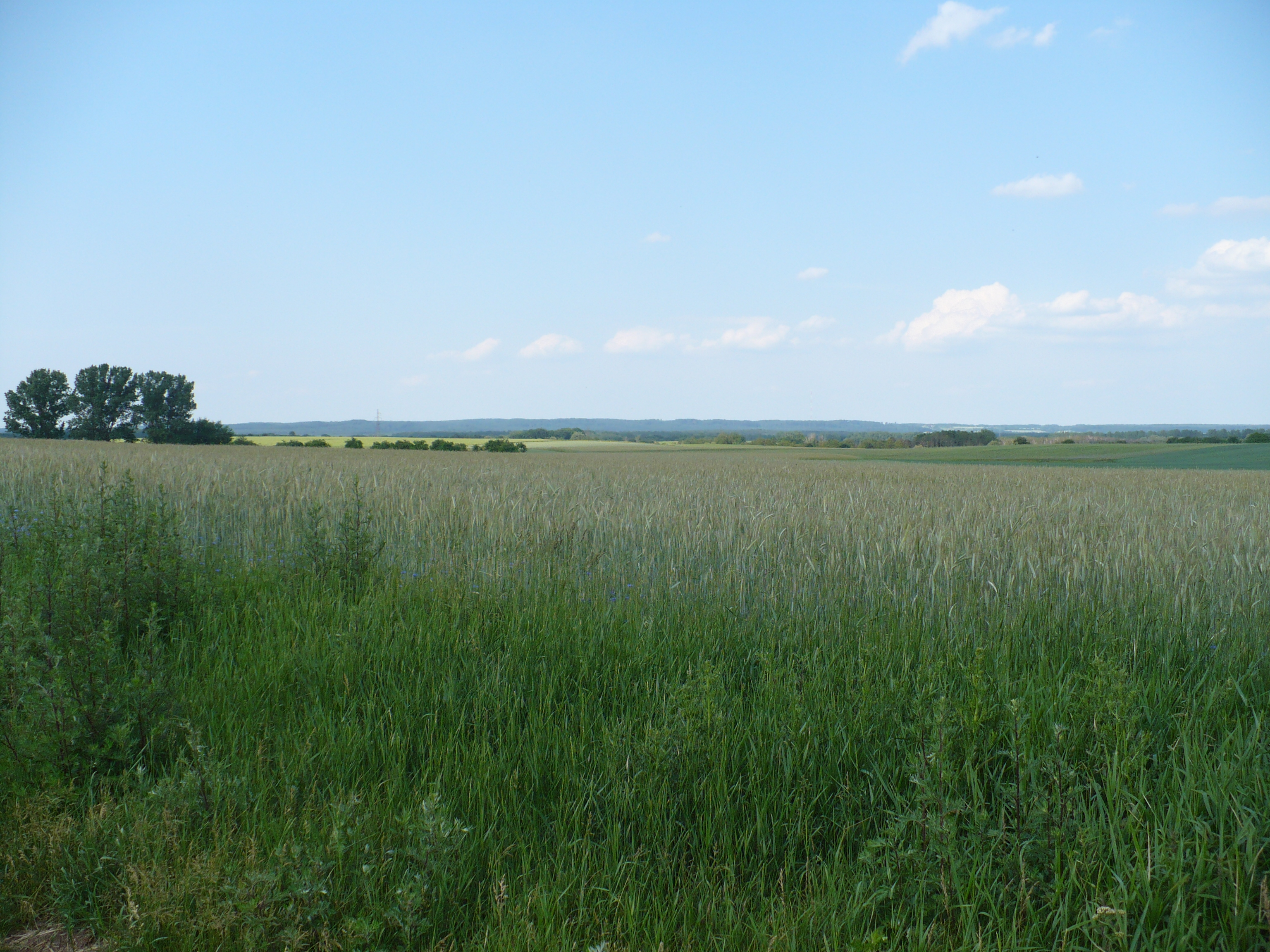 Łysa Góra koło Wełtynia (Gryfino, West Pomerania) - w tle Wzgórza Bukowe